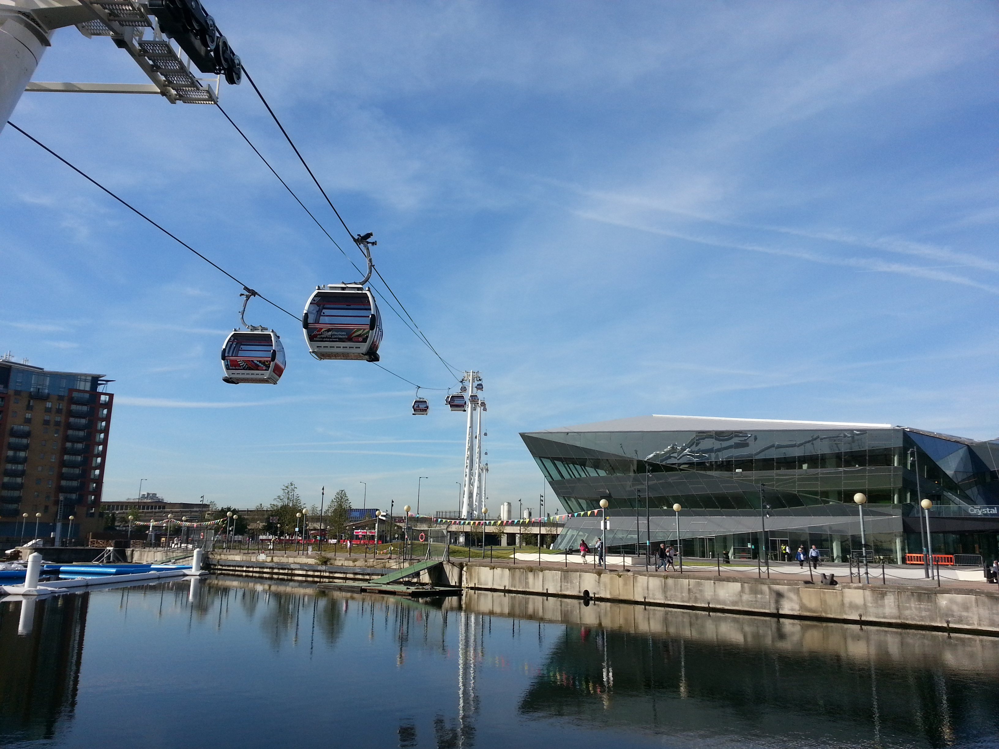 Emirates Air Line cable car, London